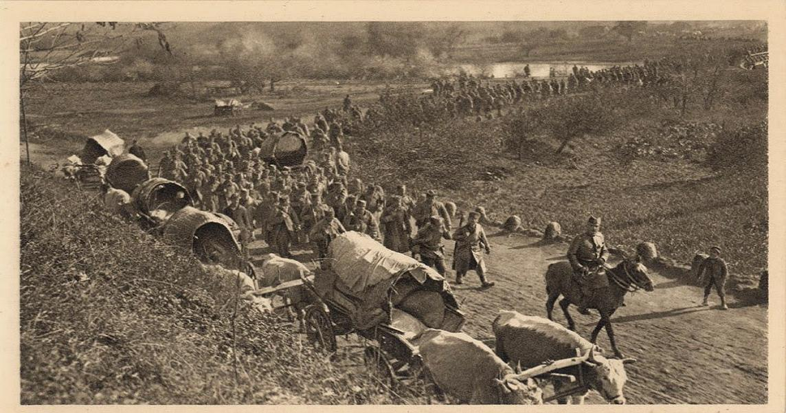 Повлачење српске војске долином Мораве, фотографија Самсона Чернова објављена у албуму „Петогодишњи рат – Срби 1912-1916“ у Лондону 1916. године.